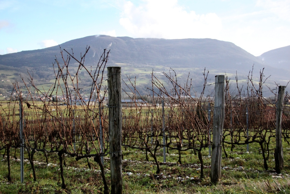 Vignoble de Corbonod en hiver